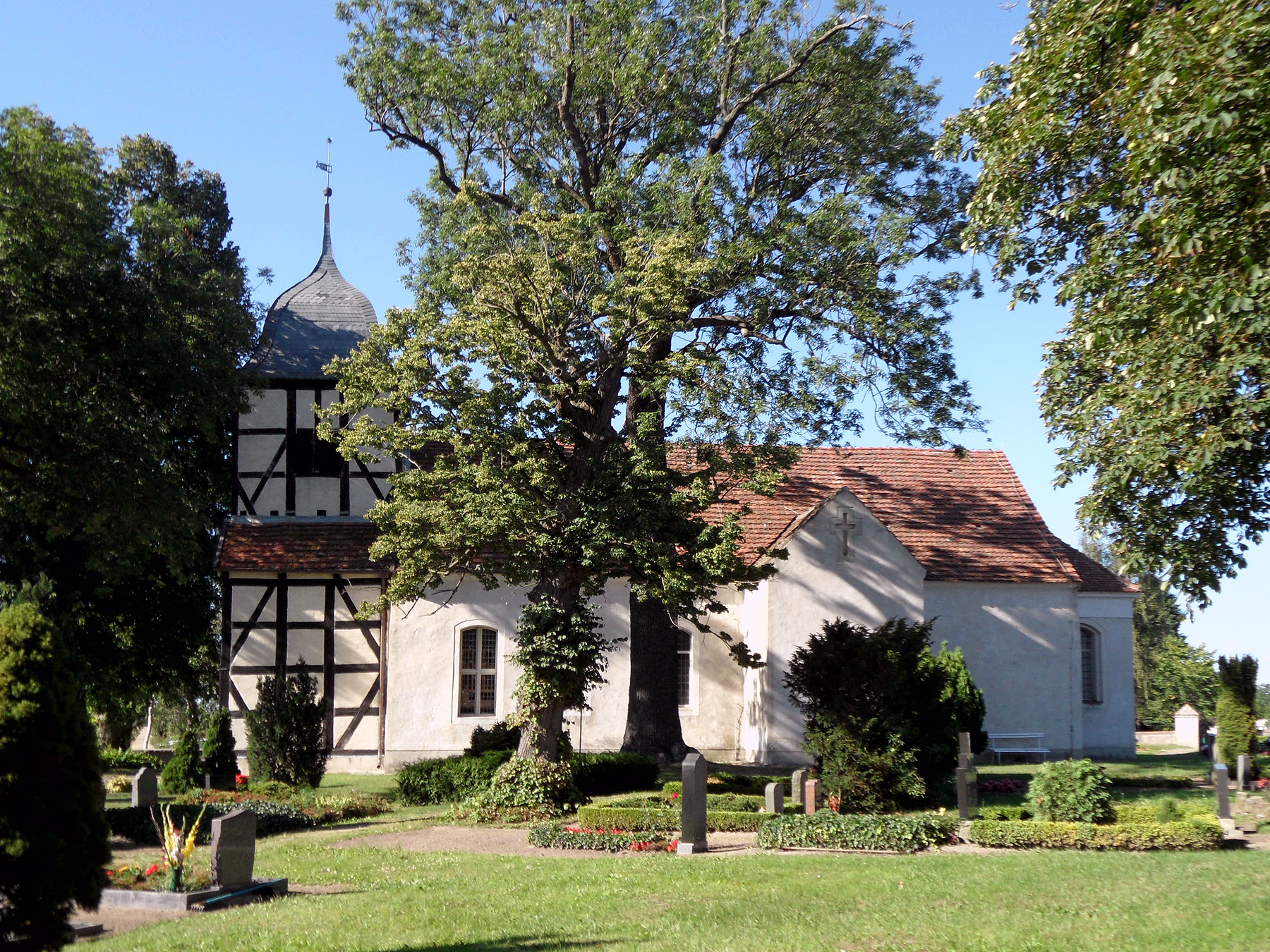 Spantekow, Amt Anklam-Land, Landkreis Vorpommern-Greifswald, Mecklenburg-Vorpommern. Kirche, Ansicht von Süden